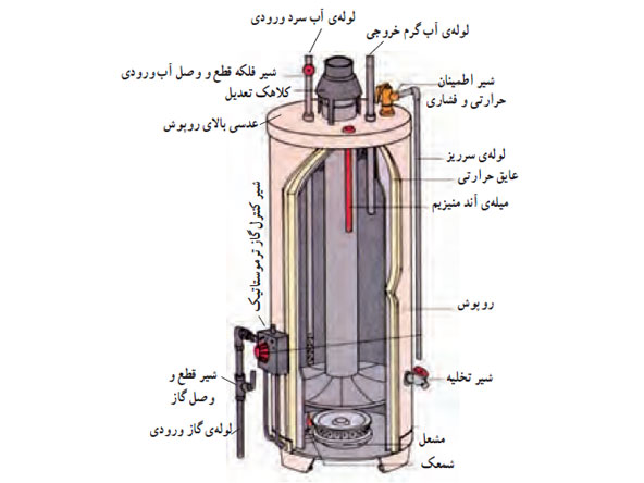 ابگرم کن منبعی